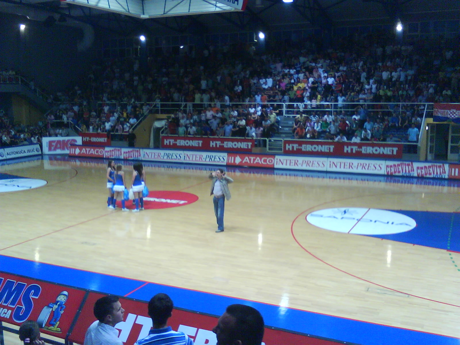 Pecara basketball stadium in Široki Brijeg